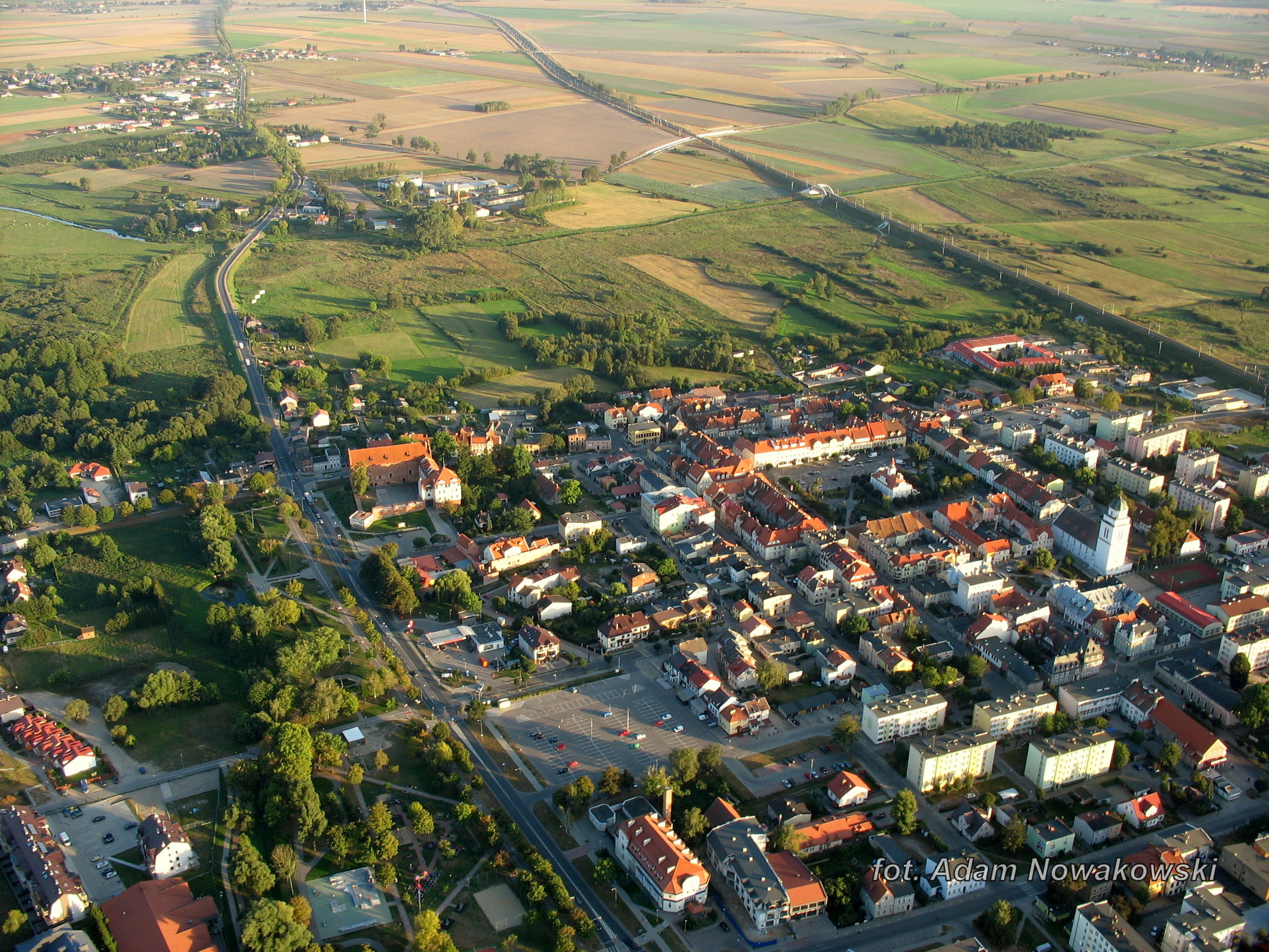 Działdowo, widok z lotu ptaka